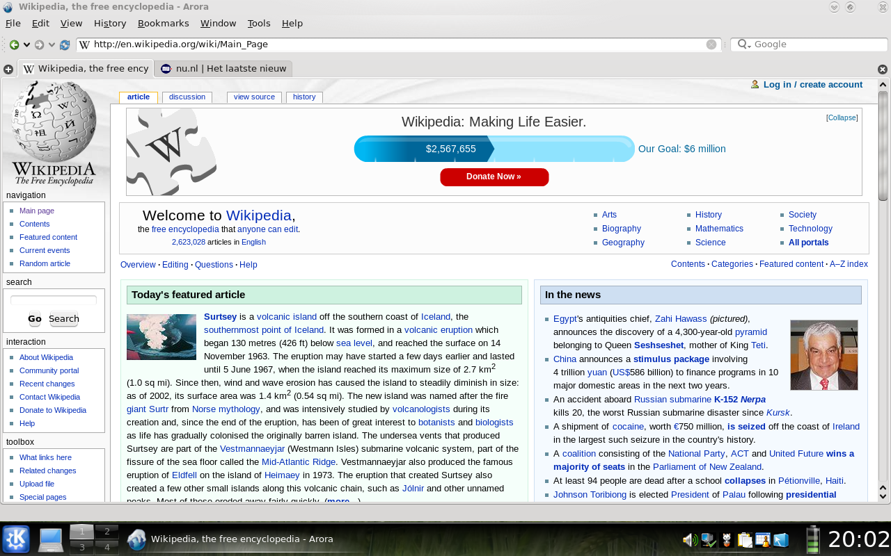 Schermafdruk van Arora webbrowser op KDE 4.1